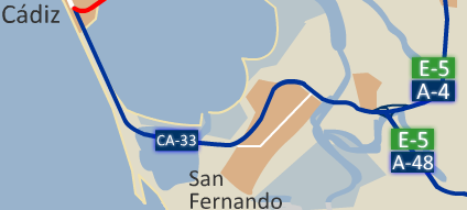 Derivada de